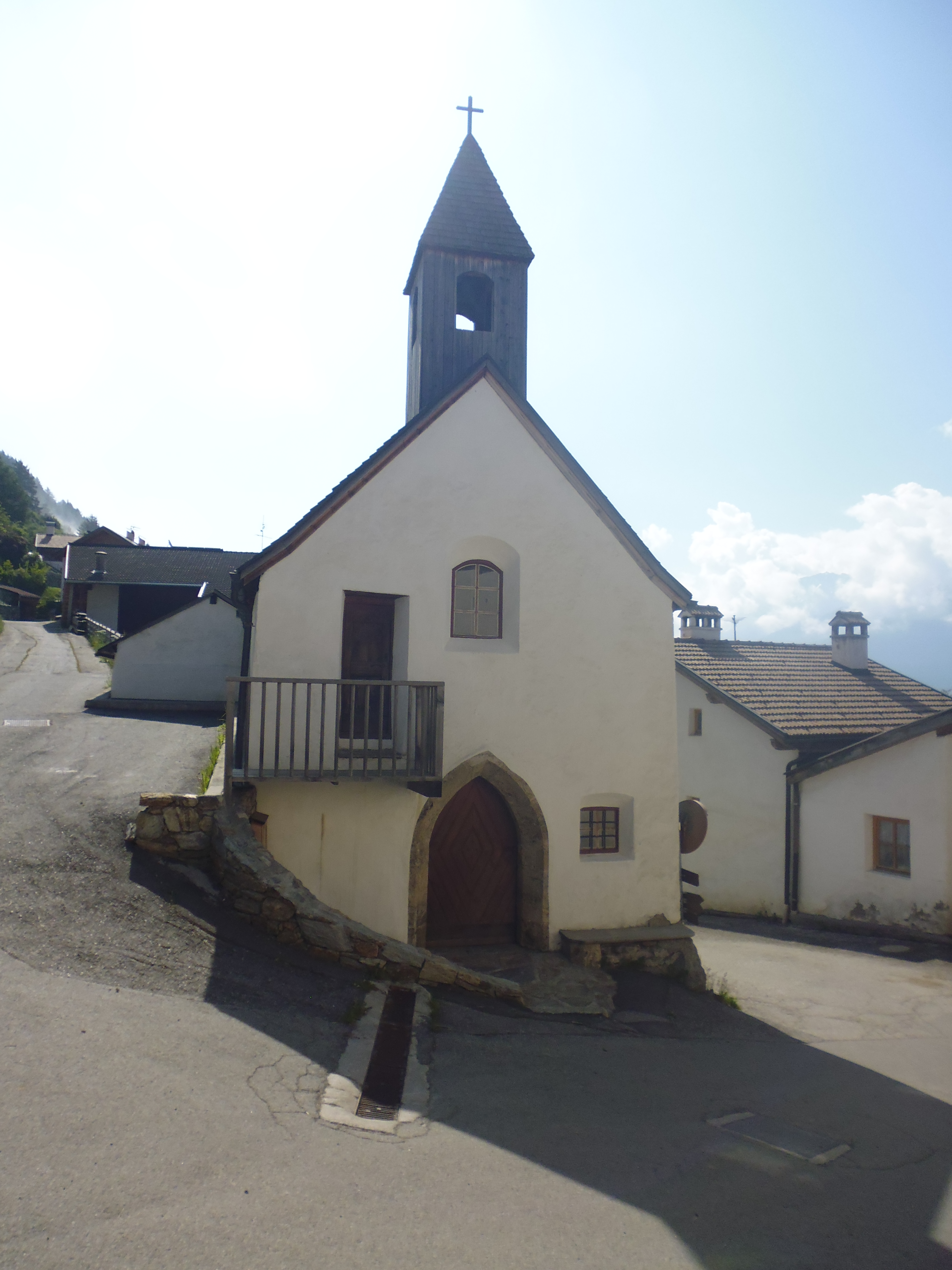 St. Anna in Tanas in Südtirol